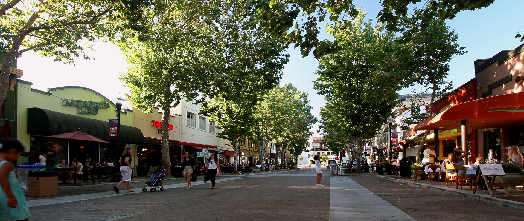 Saturday at Sunnyvale